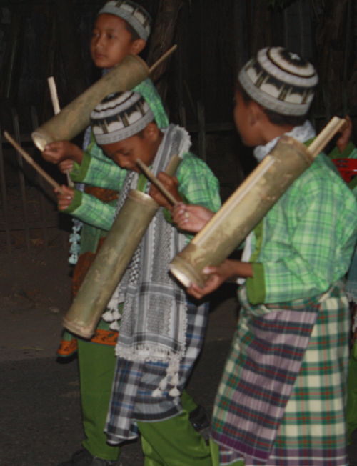 Basa Jawa: Kentongan